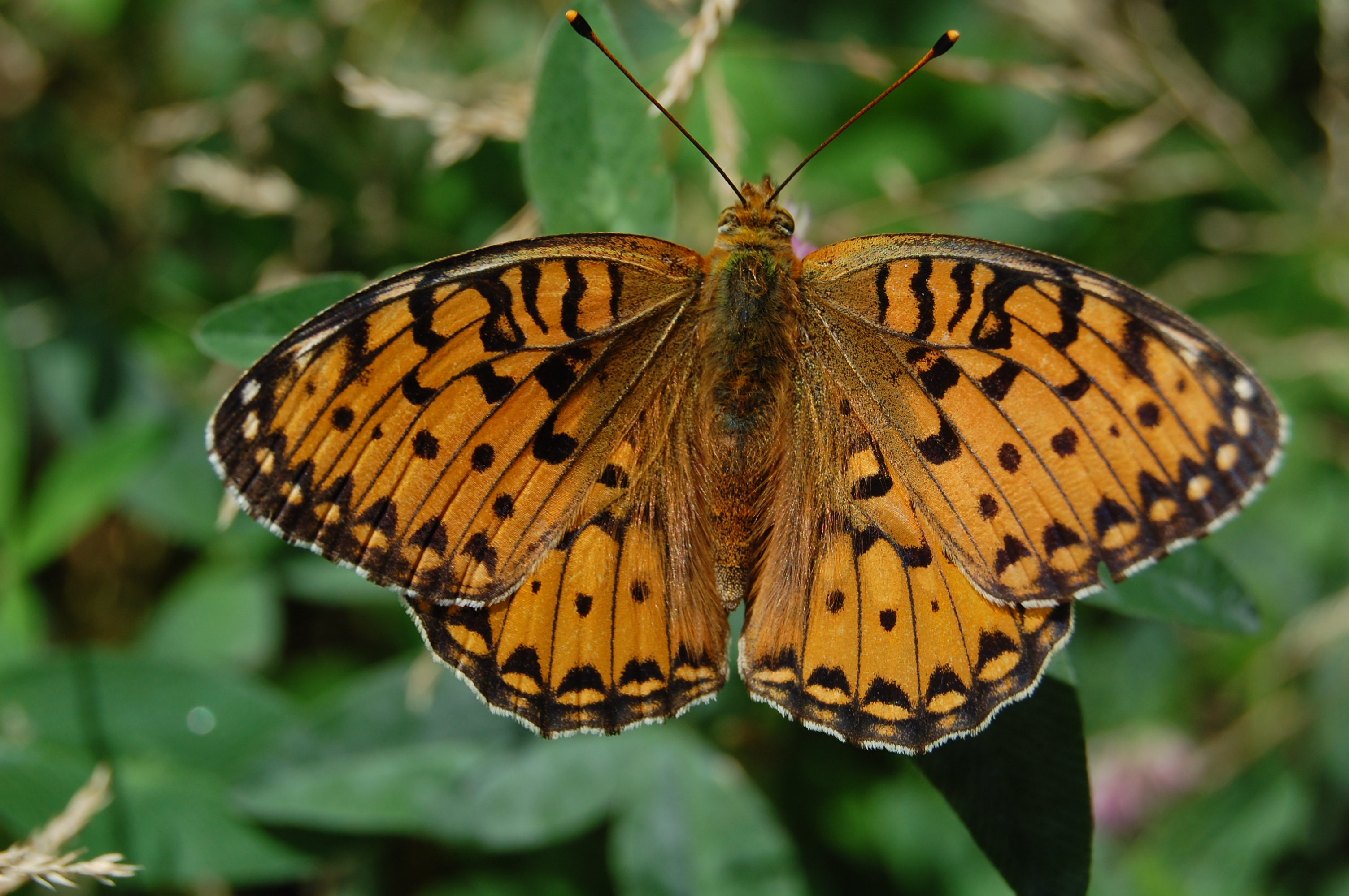 Großer Perlmutterfalter, Waldrand bei Roederhof im Hildesheimer Wald